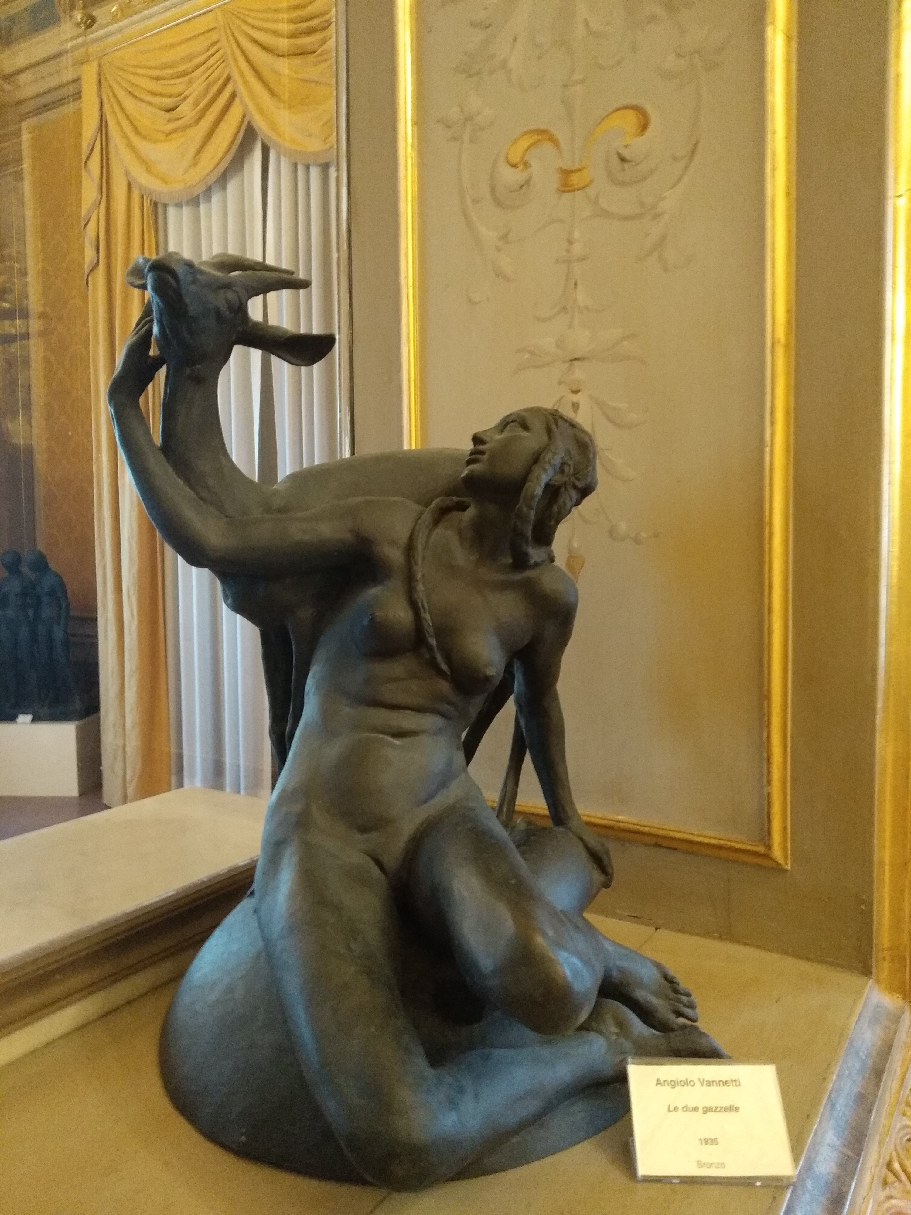 Le due gazzelle, bronzetto di Angiolo Vannetti custodito al Museo Fattori